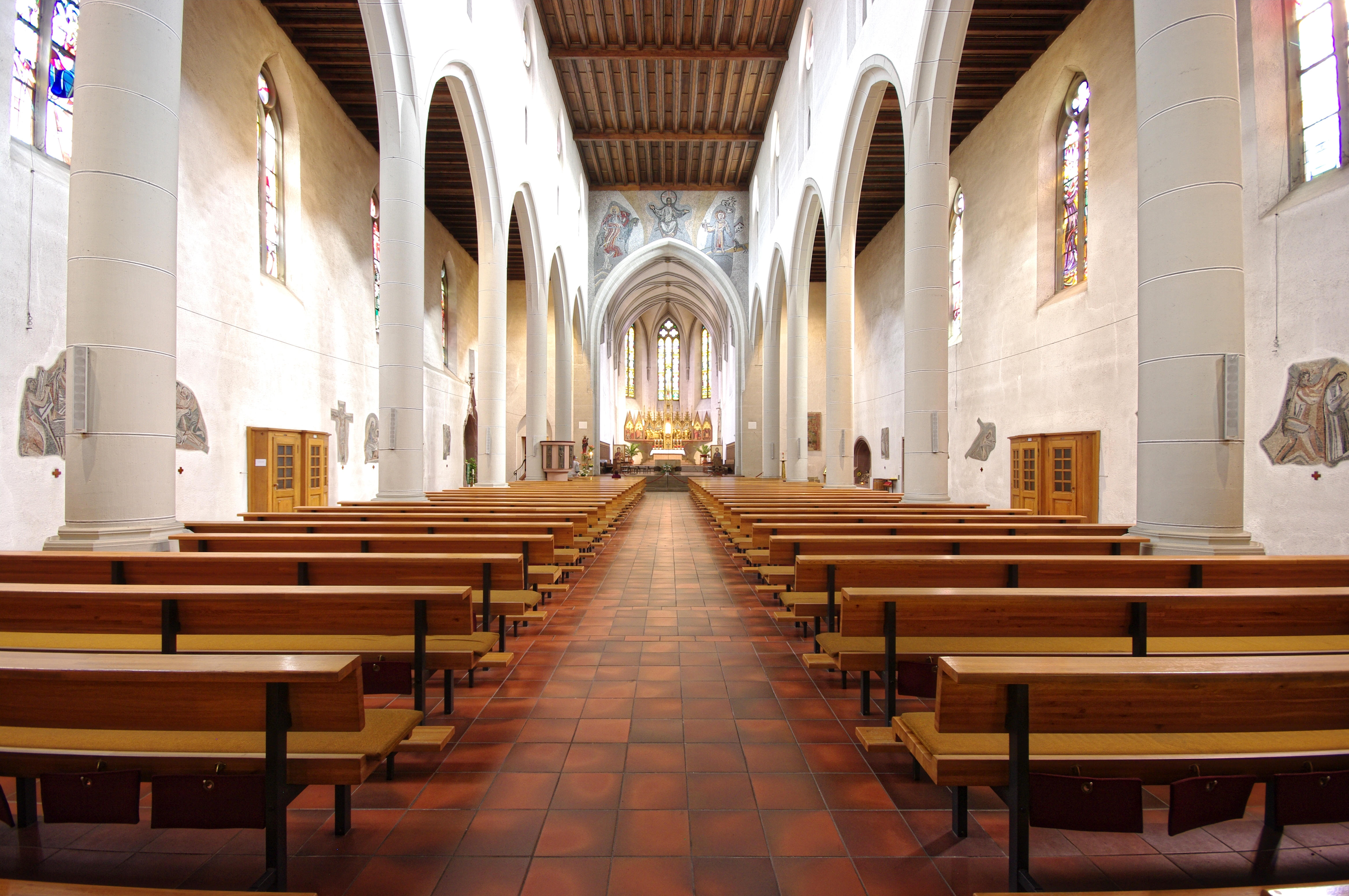 St.Martin in der Innenstadt Kirchenschiff